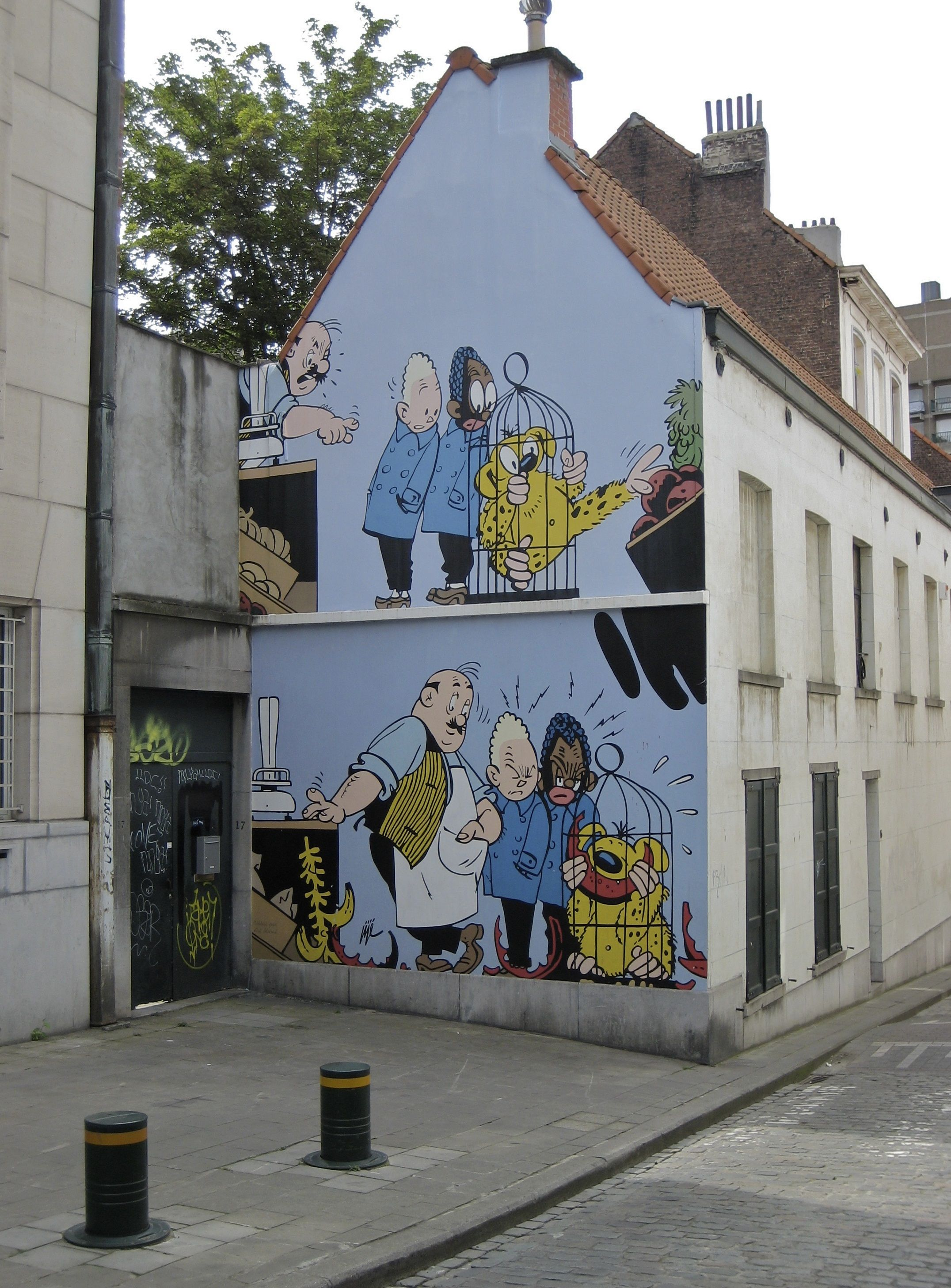 stripmuur Blondie en Blinkie te Brussel